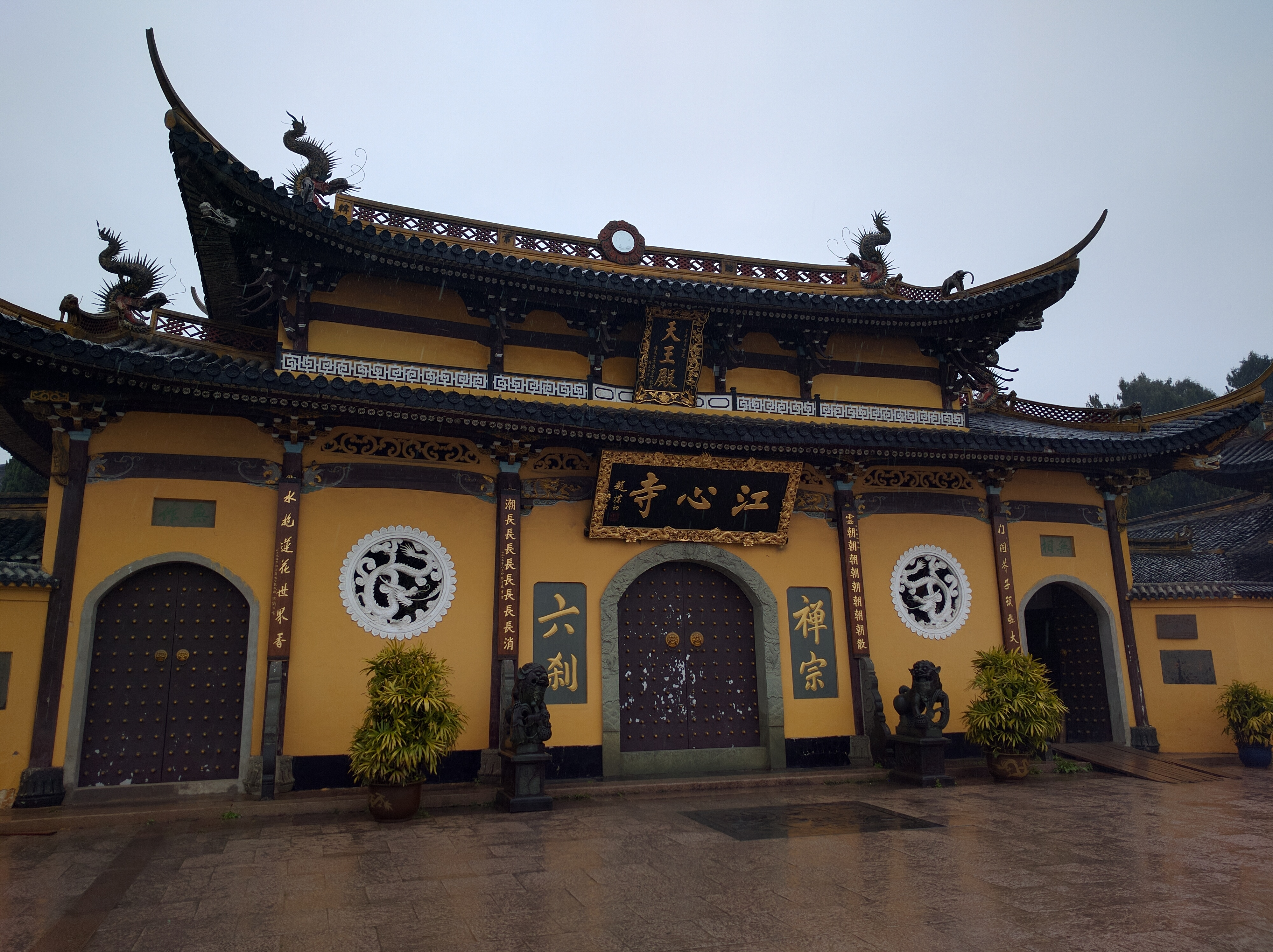 浙江省温州市江心寺